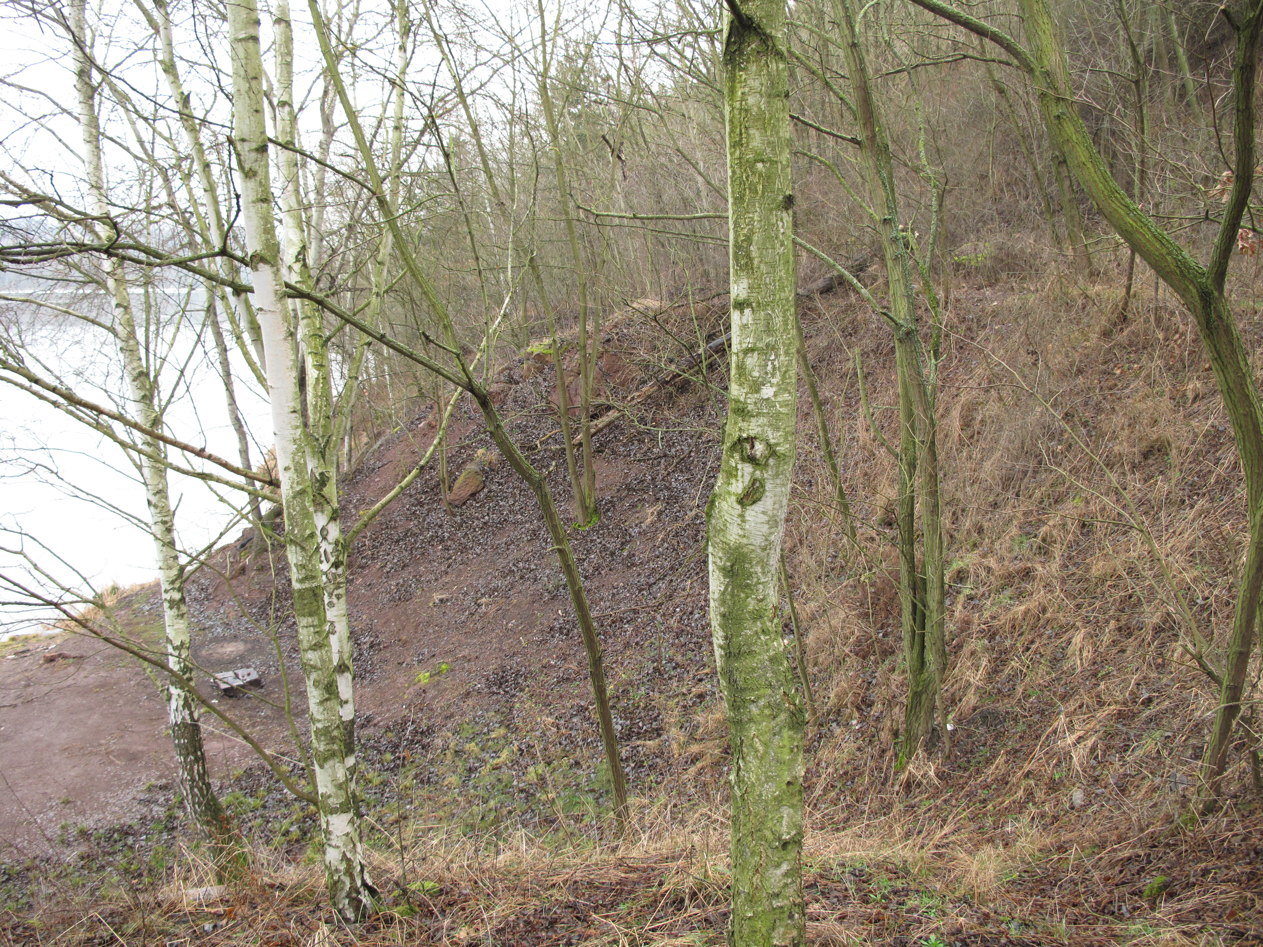 Volné místo v přírodní památce Ejpovické útesy. Okres Rokycany, Česká republika.